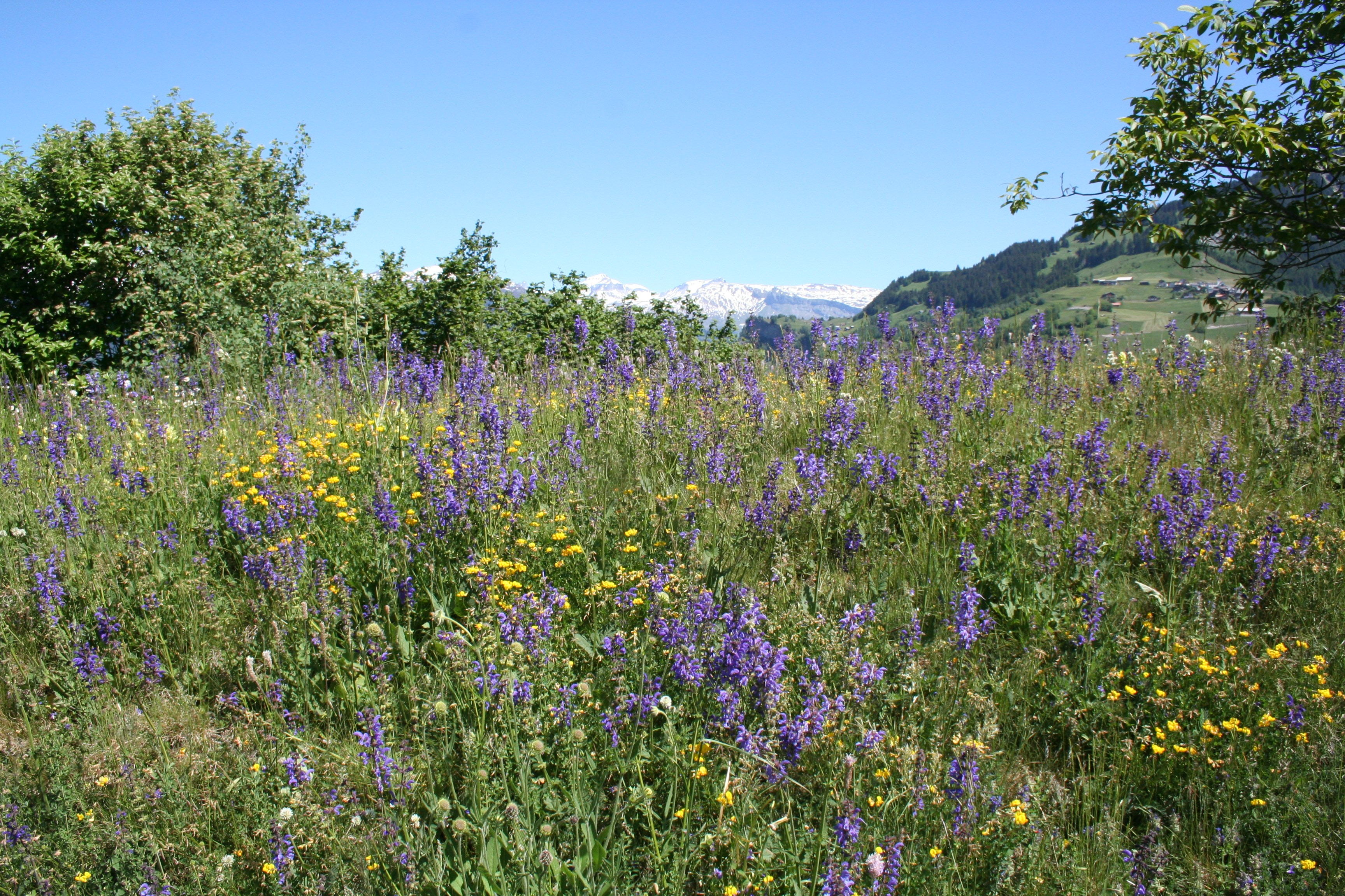 Wiesensalbei bei Pitasch, Graubünden, Schweiz.